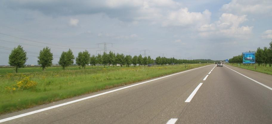 A6 Flevoland, augustus 2005